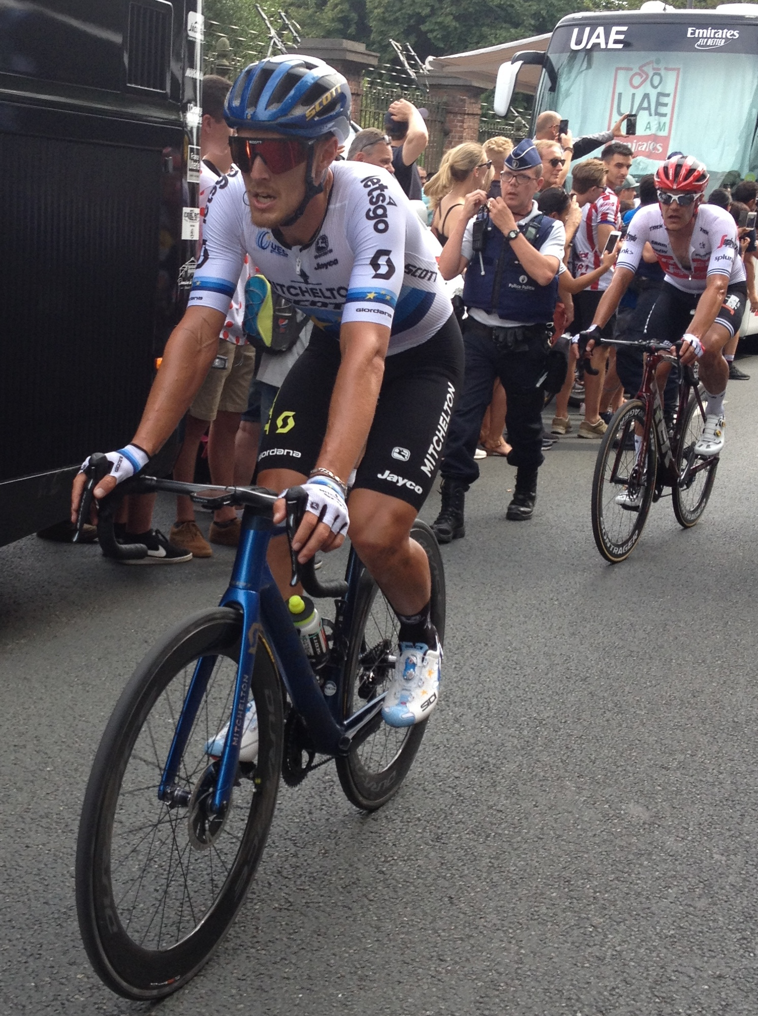 Grand Départ van de Tour de France in Brussel, finish in Laken op zaterdag 6 juli 2019